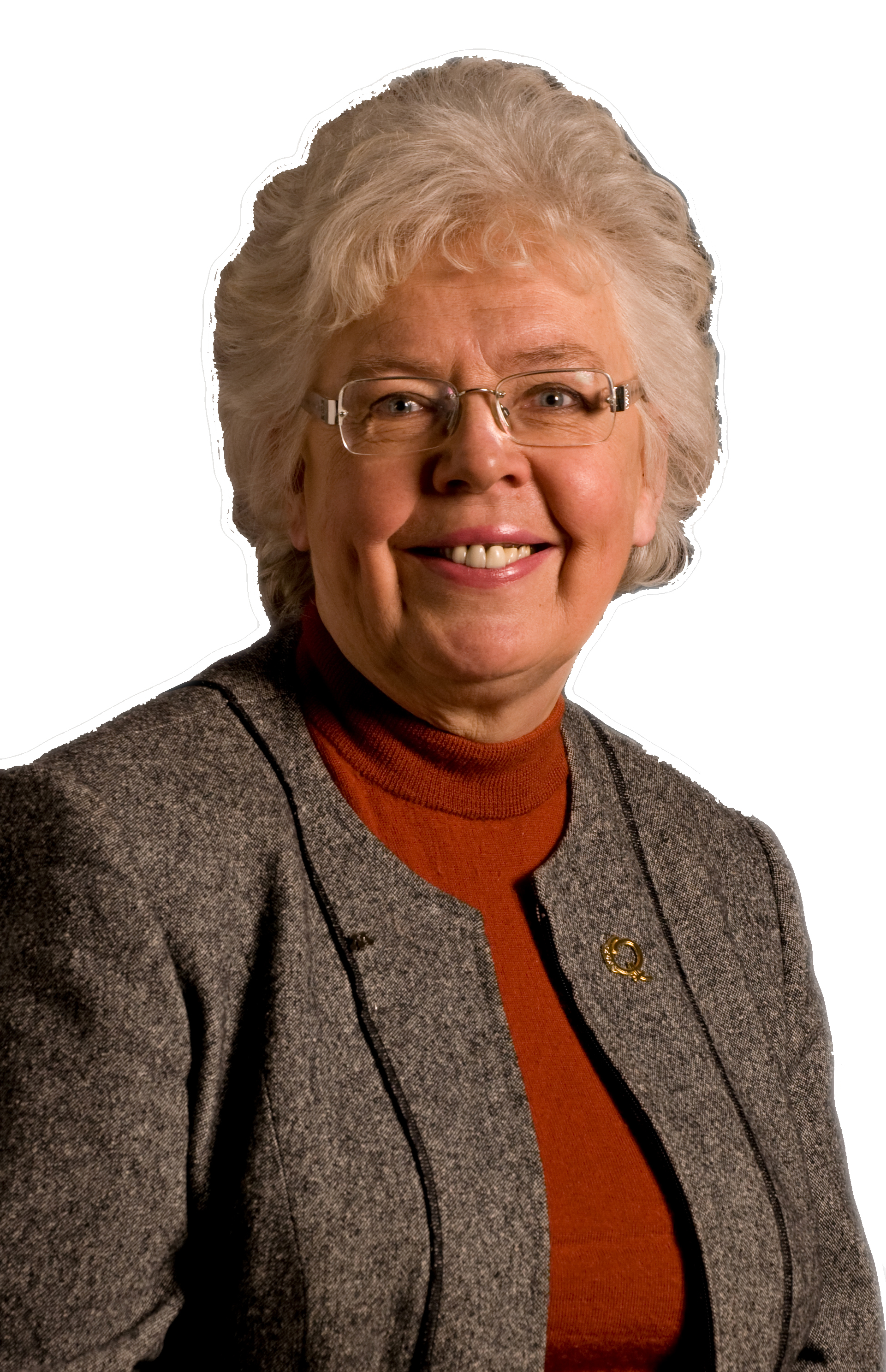 Ulla Löfgren (m), f.d. riksdagsledamot